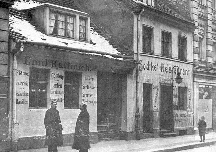 Sodtke's Restaurant